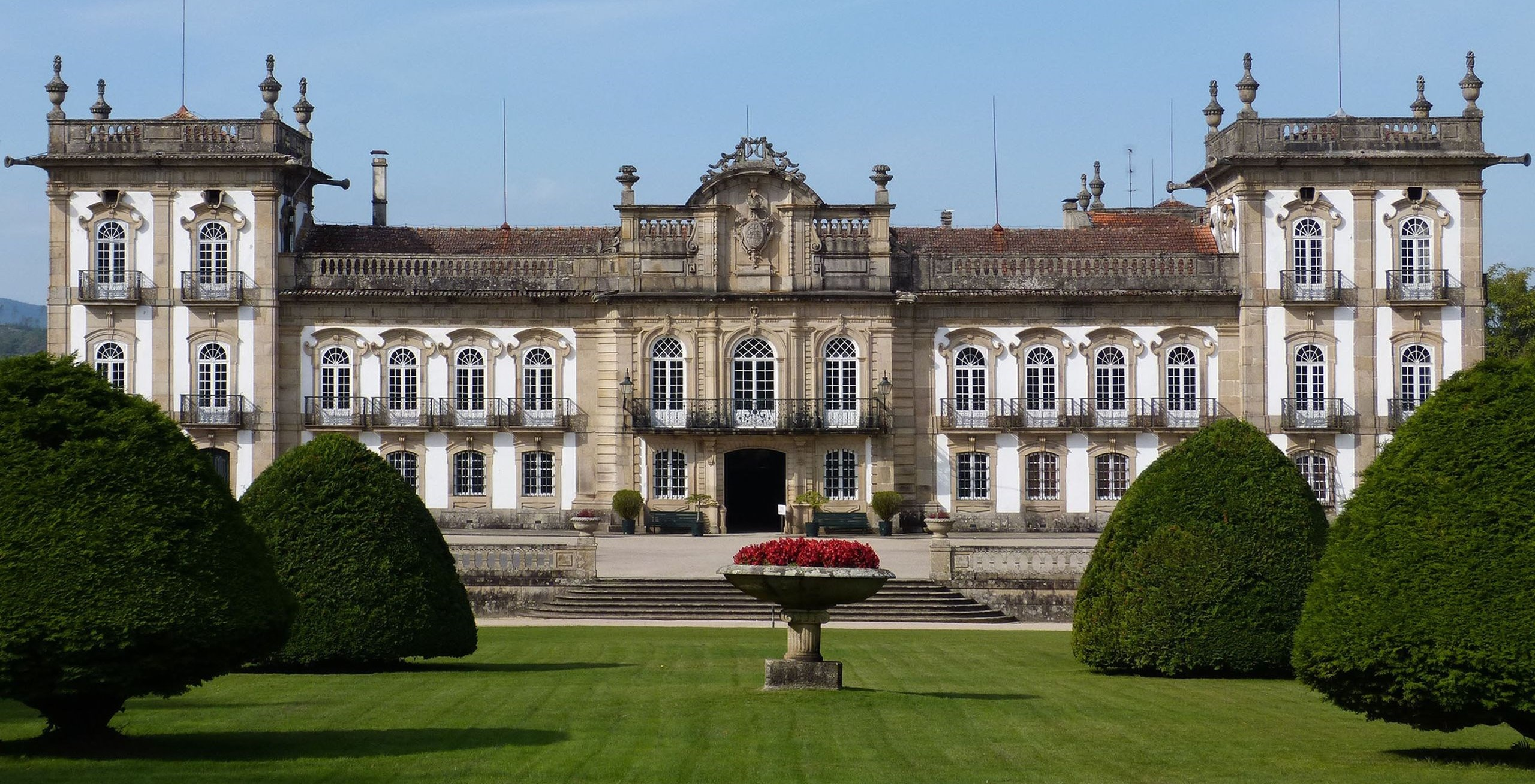 Tiempo ha que deseaba visitar esta maravilla que tienen nuestros vecinos portugueses...Al fin encontré ocasión..hoy mismo...Y, valió la pena...